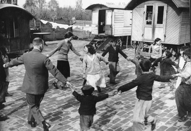 Berlin-Weißensee, Lager von Sinti und Roma Mit dem Berliner Zigeunermissionar im Zigeunerlager (Berlin Weißensee). Missionar Süßkind mit seiner Gehilfin im Rundtanz mit ihren Zigeunerkindern. 1932